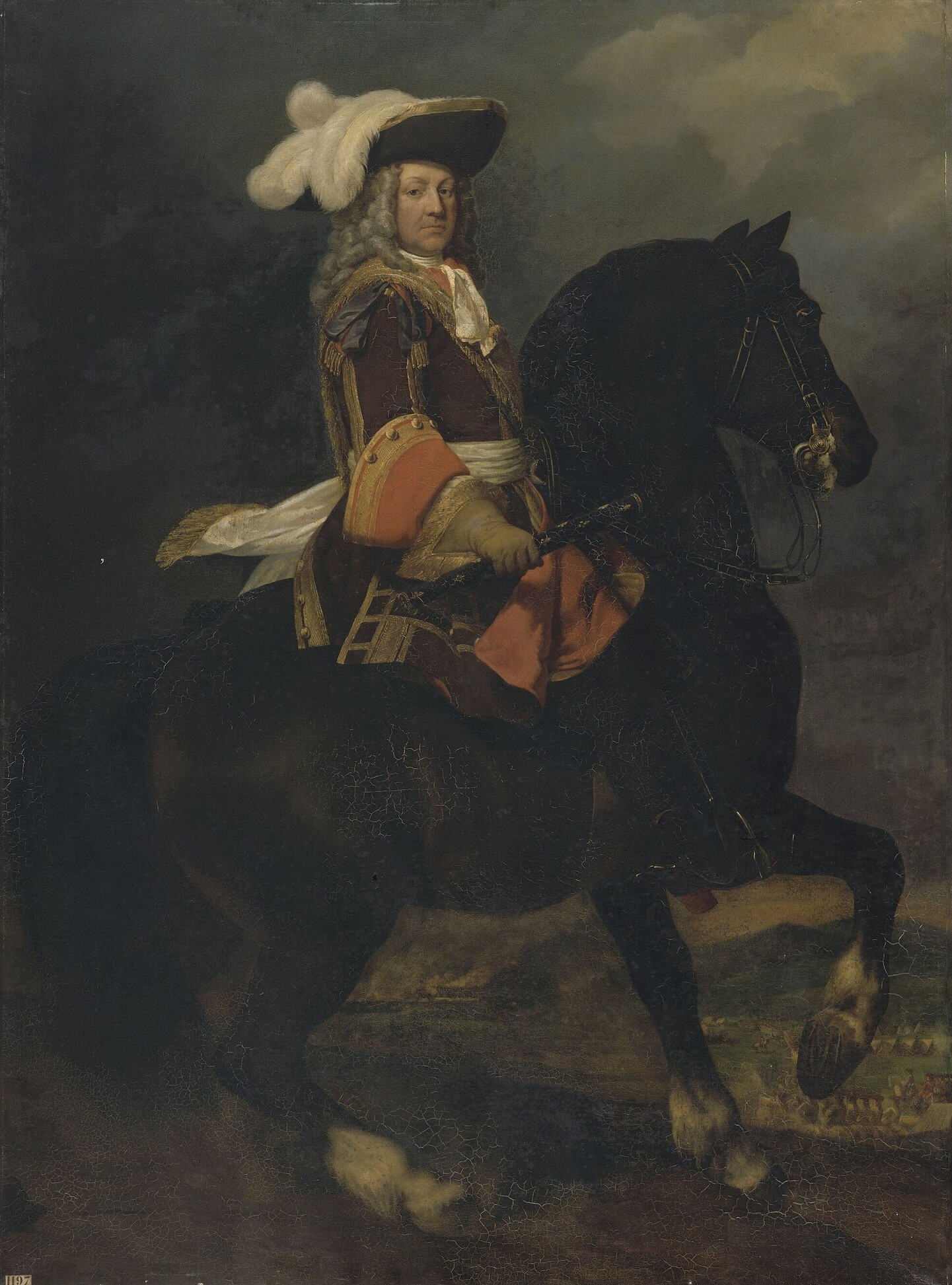 Portrait de Louis Joseph, duc de Vendôme, Maréchal de France, 1706